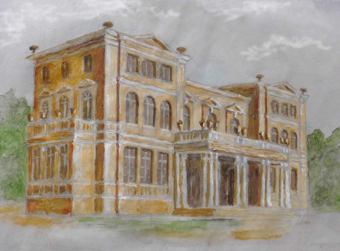 Klein-Glienicke Restauration Rekonstruktion des ursprünglichen Zustandes um 1900